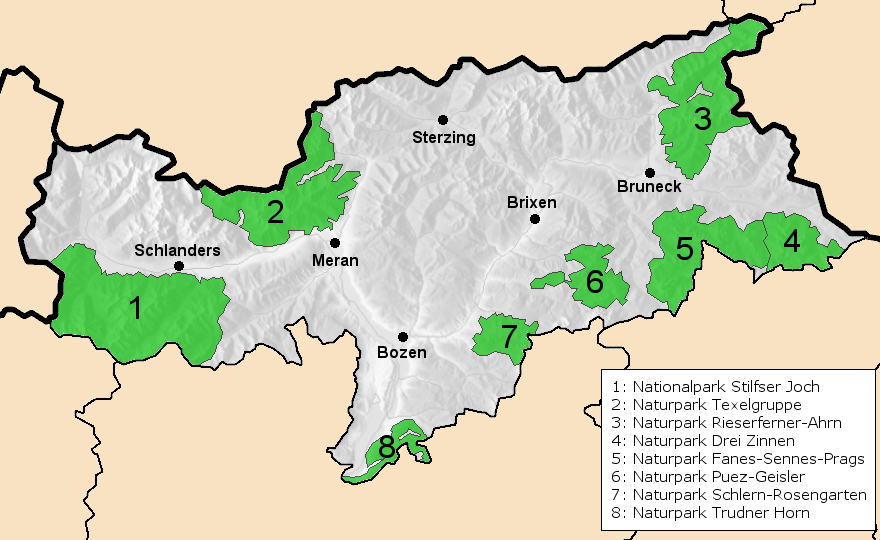 Der Nationalpark und die sieben Naturparks in Südtirol